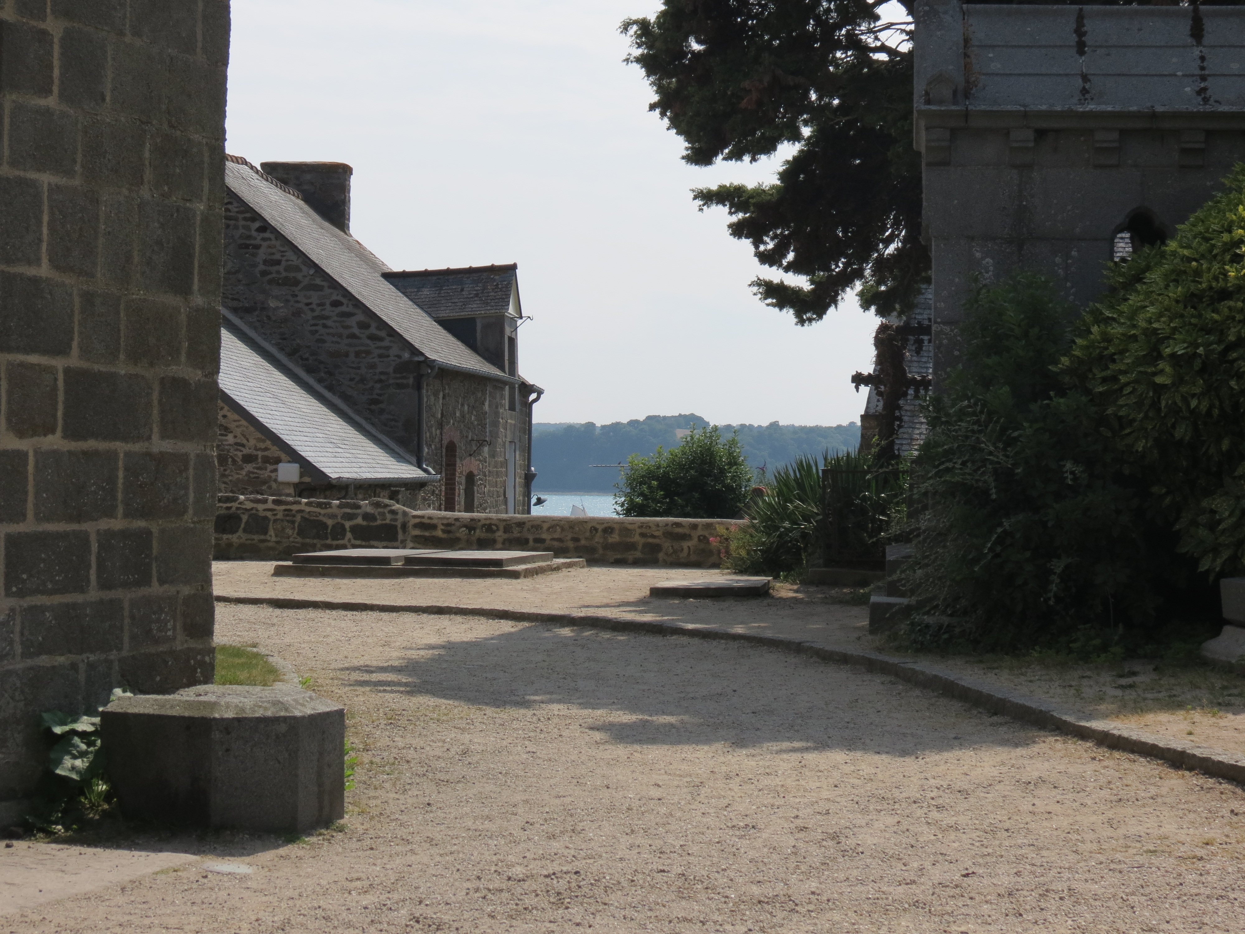 Vue depuis le jardin de l'Église de Saint-Suliac (Bretagne, France)